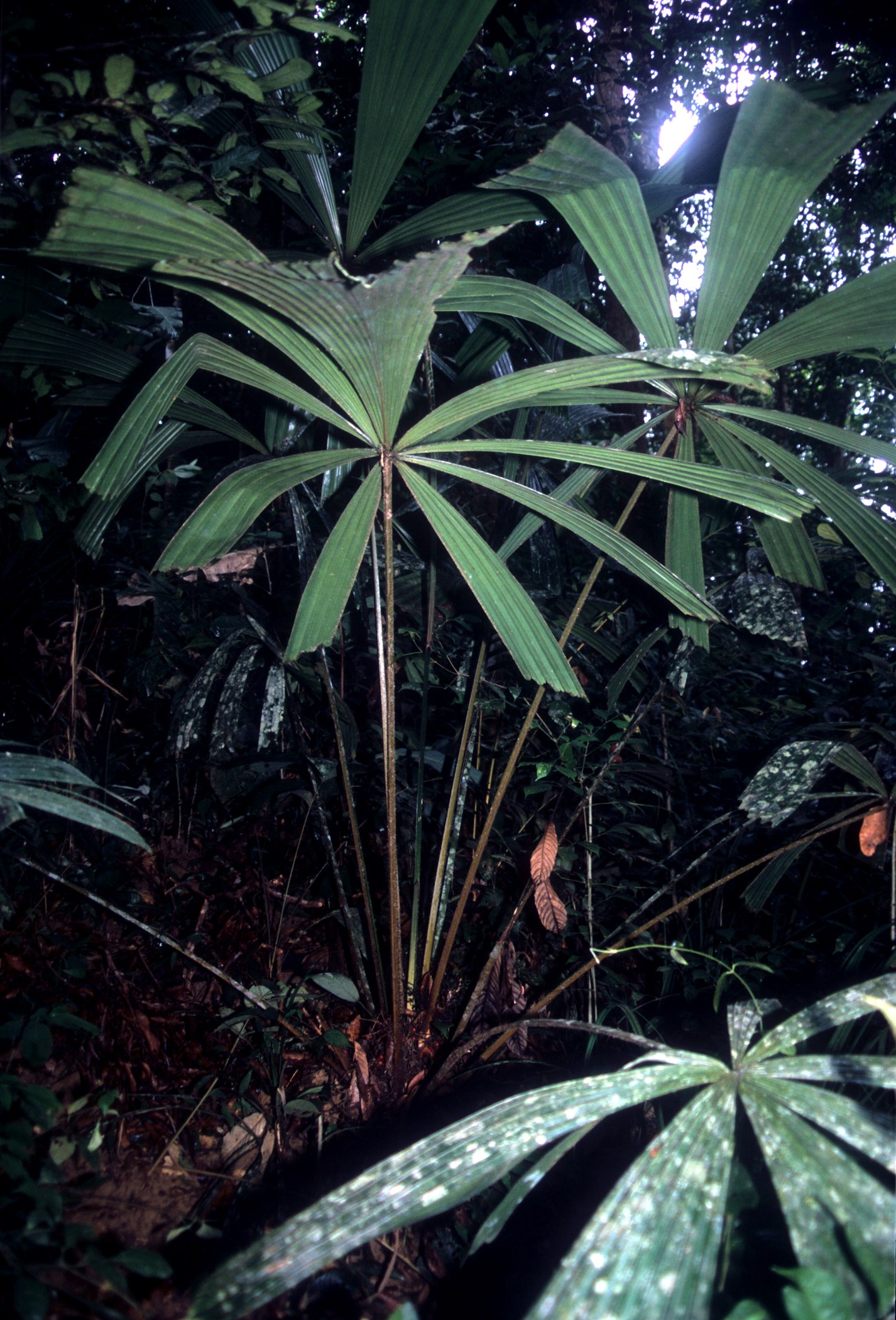 Sungai Nipah, Terengganu, Malaysia. Oct 2002. from slide.